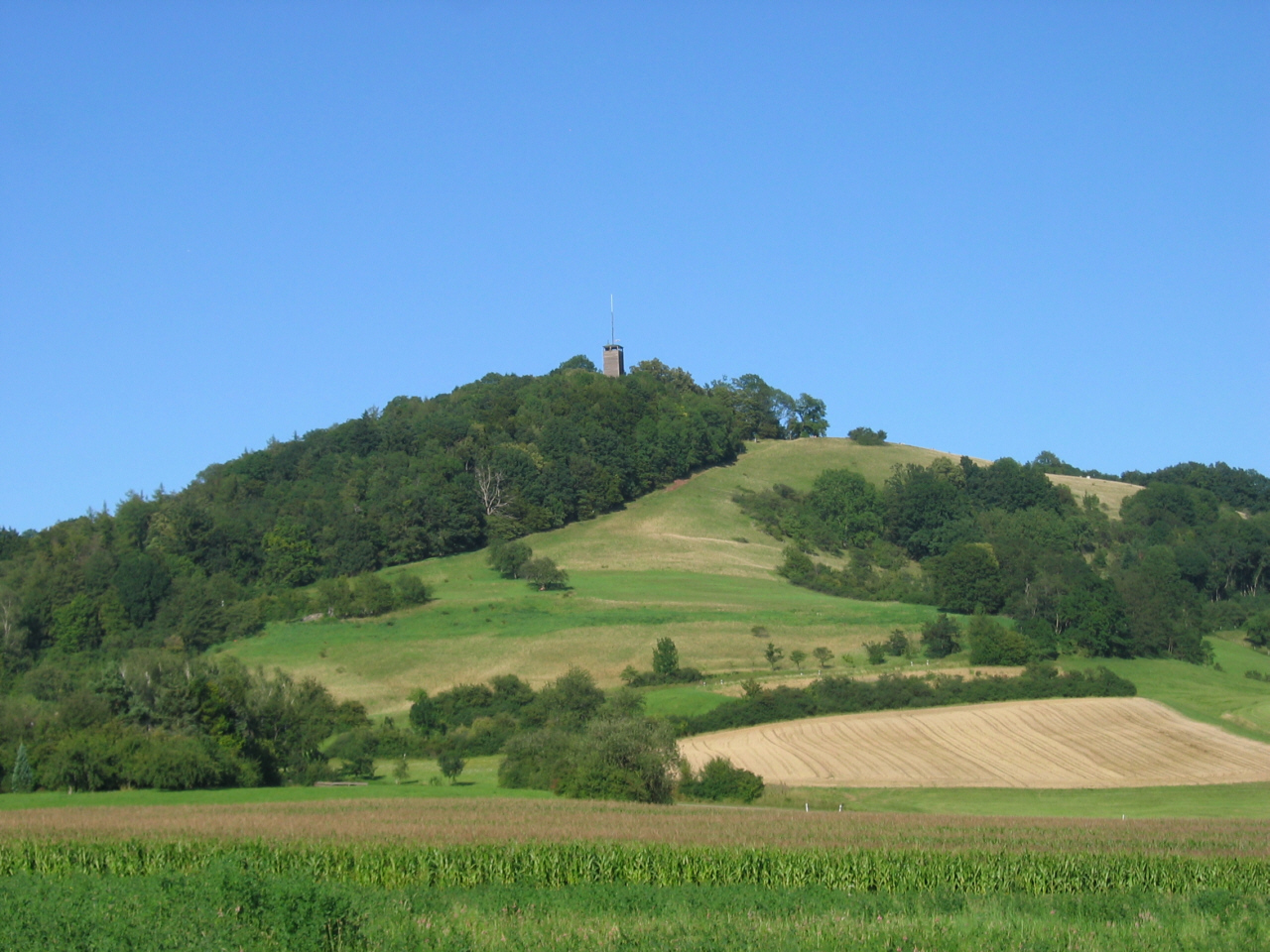 Der Einkorn bei Schwäbisch Hall, Baden-Württemberg, Deutschland.